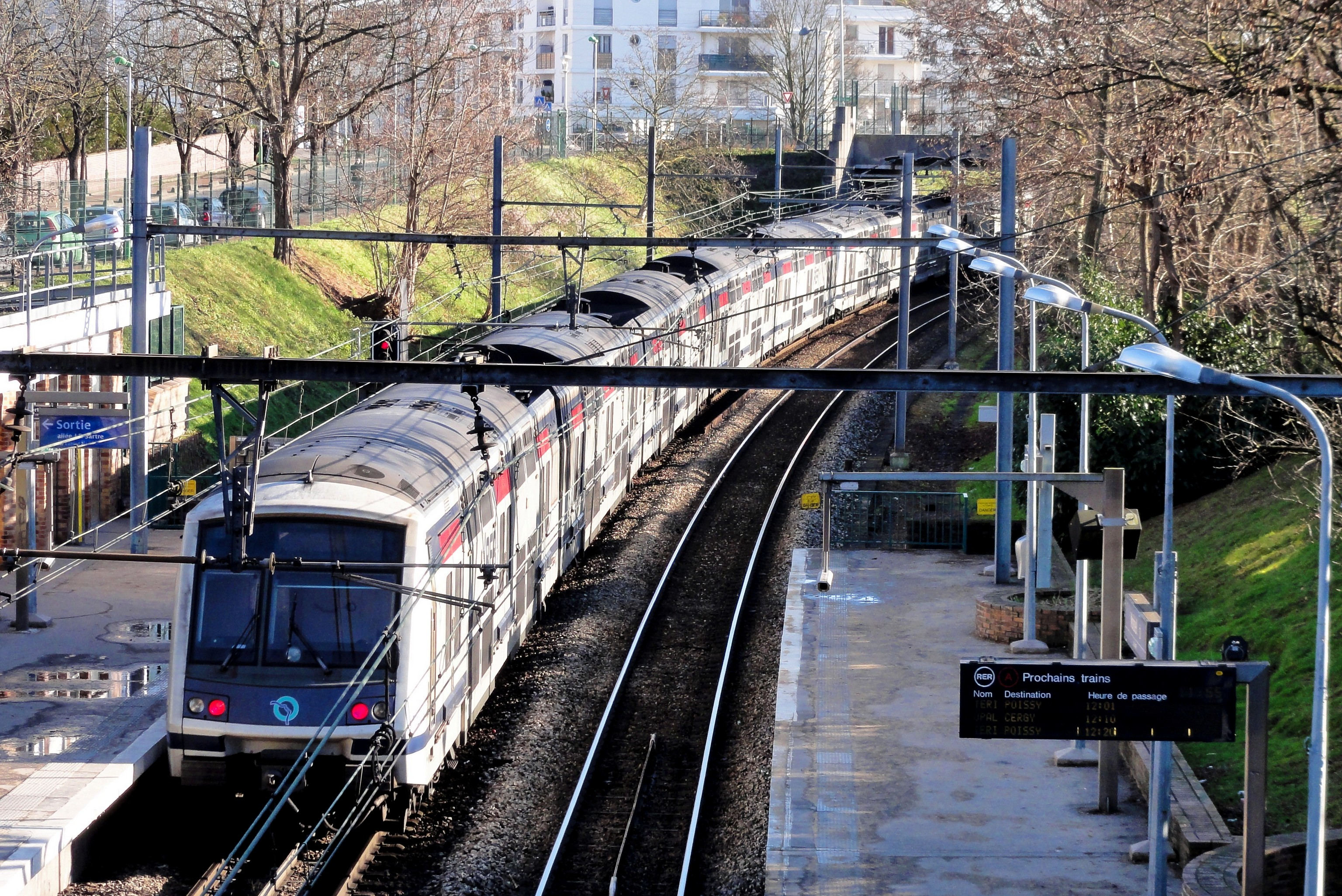 RER à la gare de Noisiel (77)